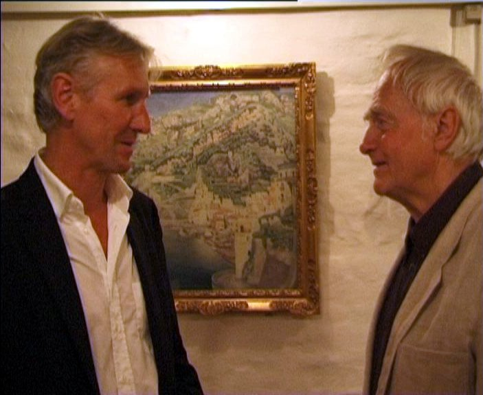 Modersmål-Prisen 2003: Steffen Brandt (tv) og 2002: Ib Spang Olsen (th)